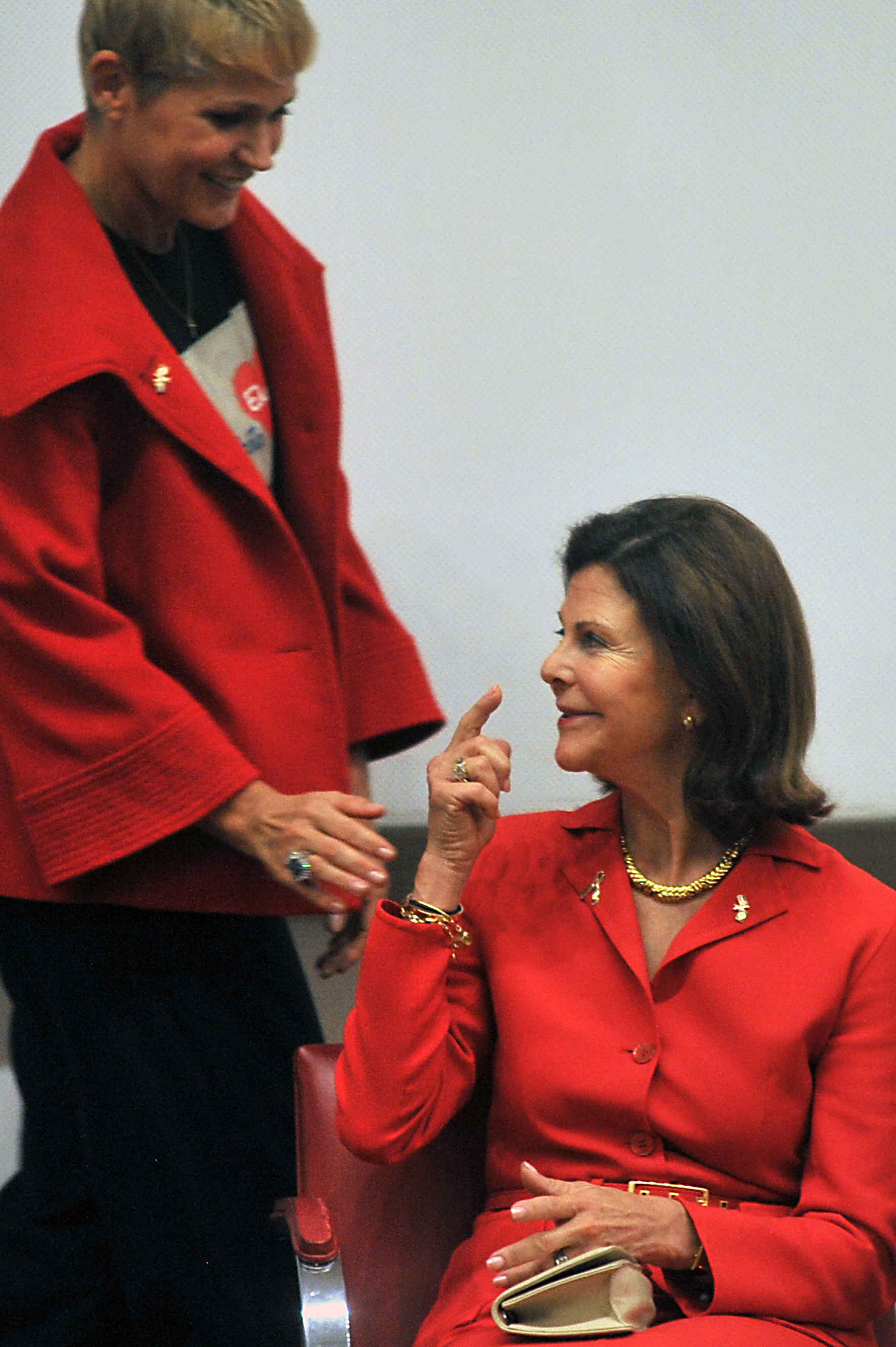 A rainha Silvia, da Suécia, e a apresentadora Xuxa Meneghel, participam de Seminário sobre Experiências de Legislação Contra Castigos Corporais de Crianças e Adolescentes.